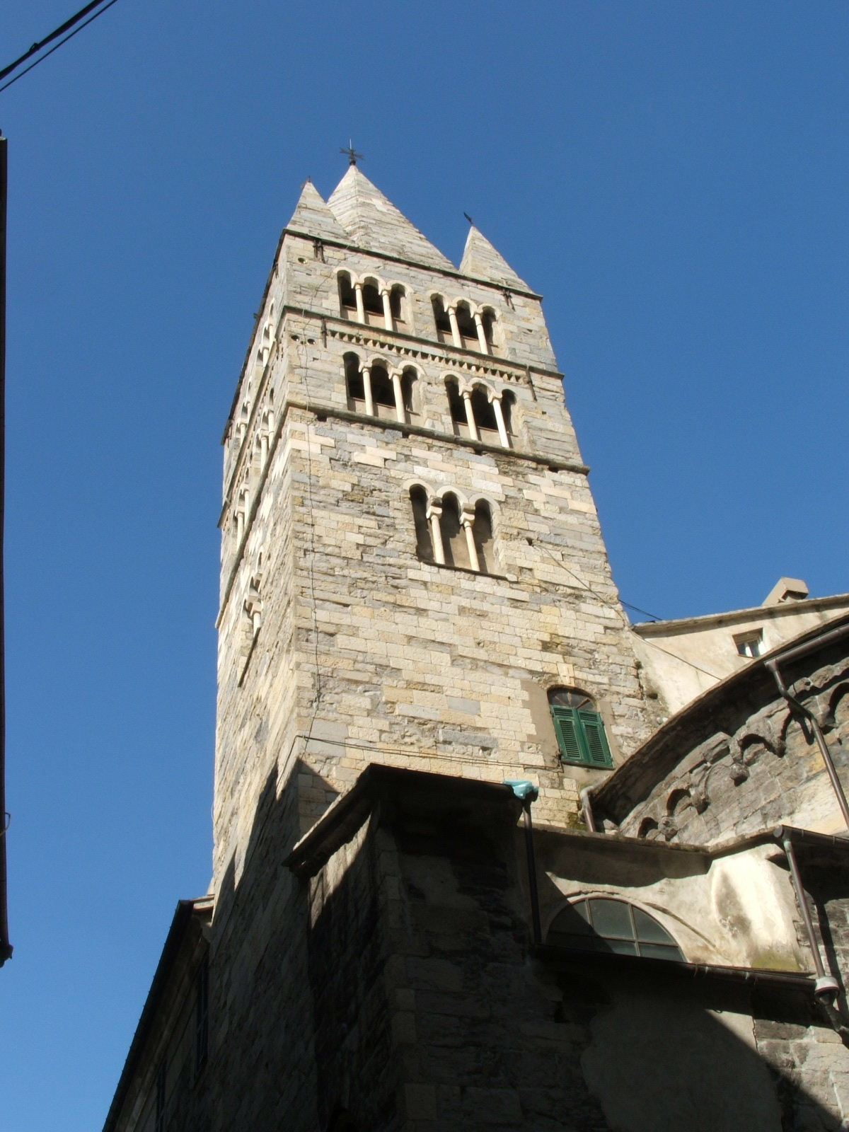 Genova, Commenda di San Giovanni di Pré